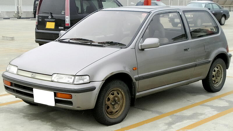 2代目ホンダ・シティ